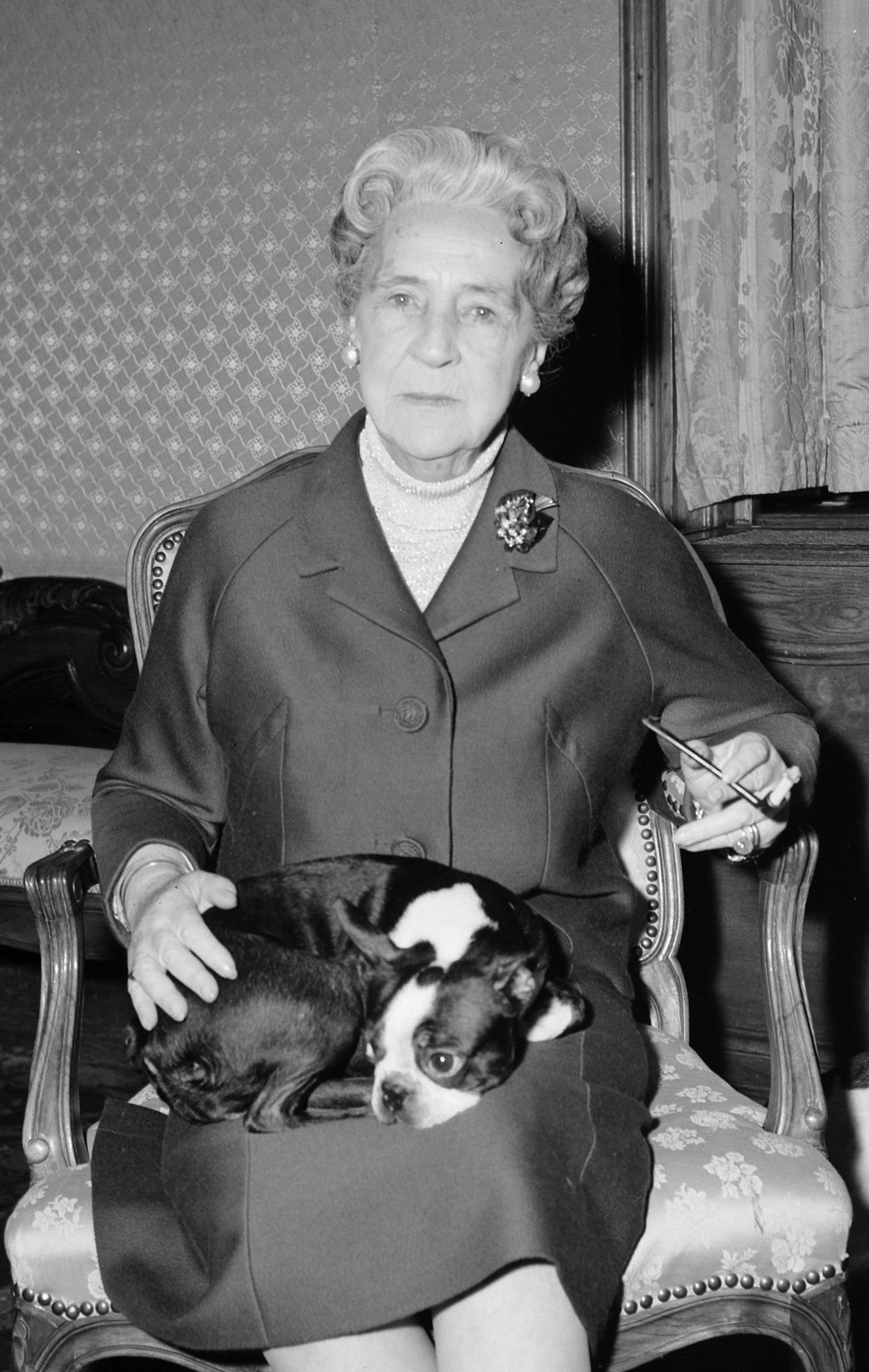 Prinses Armgard 18 december 81 jaar, hier op kasteel Warmelo